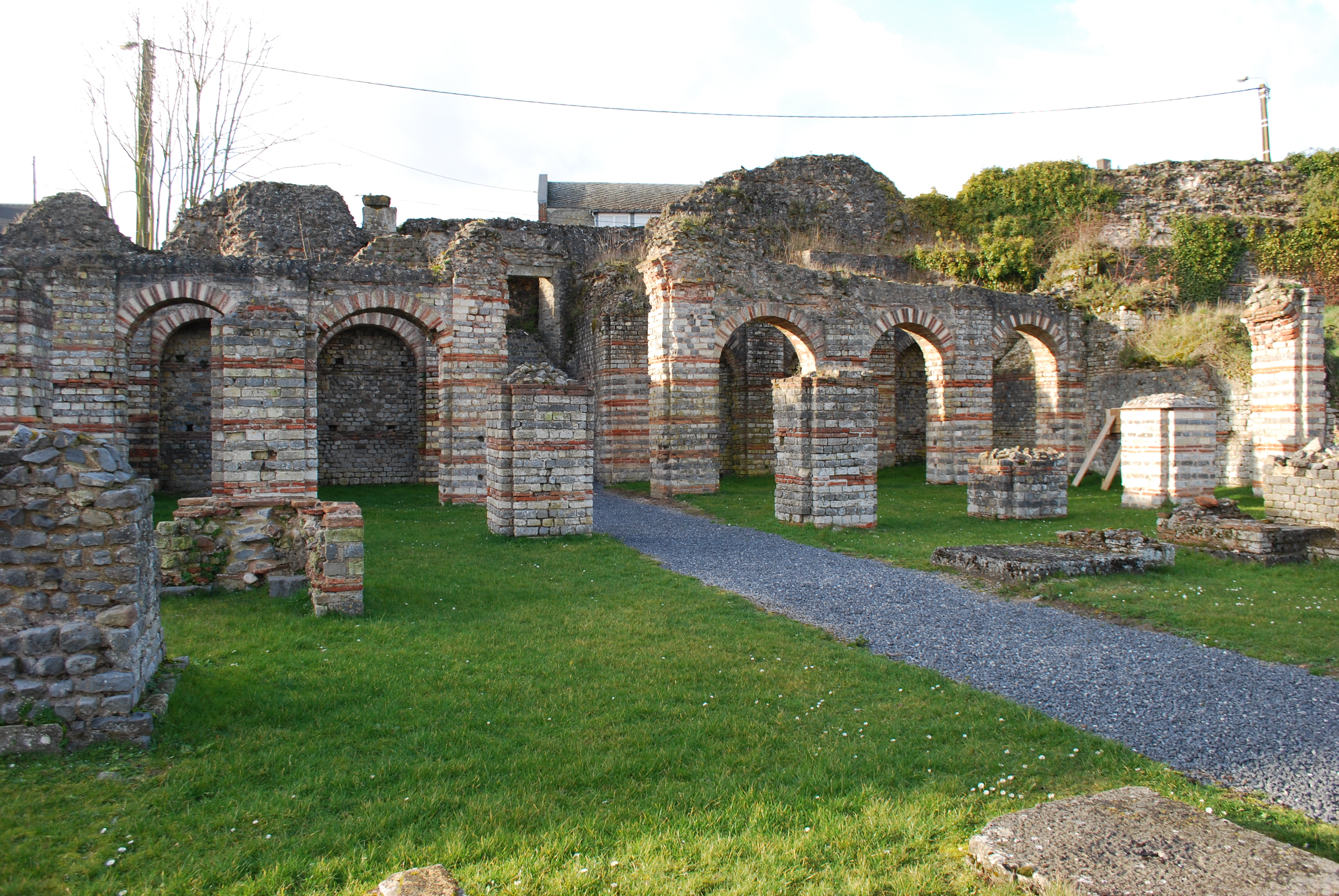 Vue de Bavay (Nord, France).